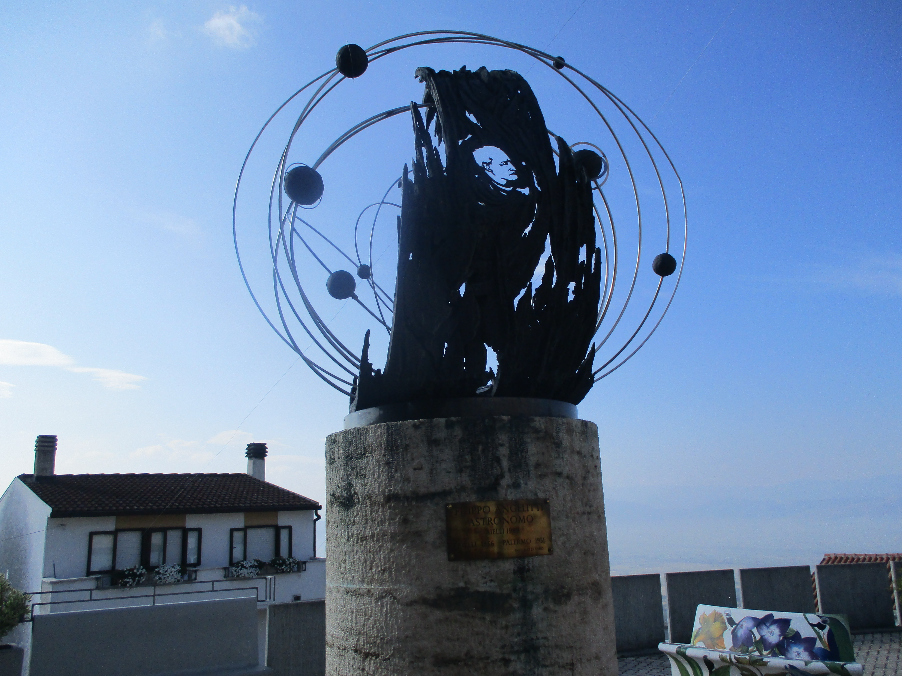 Monumento a Filippo Angelitti